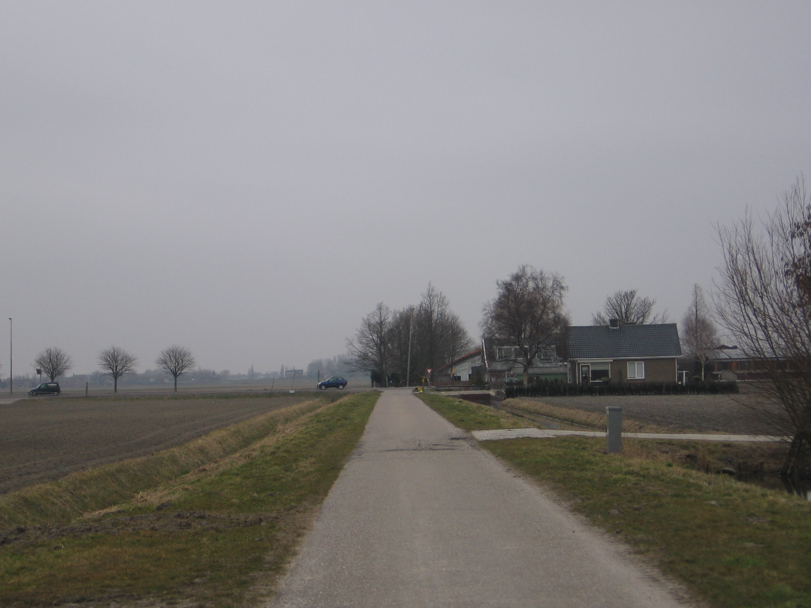 Rijnwoude and surroundings